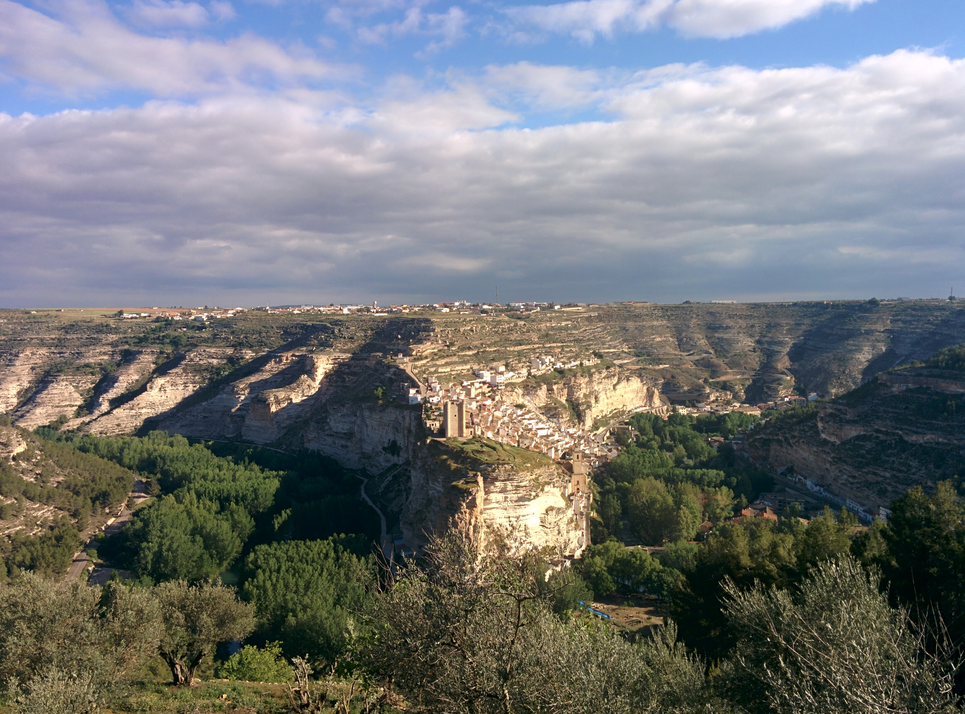 Vista de Alcalá del Júcar desde Casas del Cerro (Albacete, España).